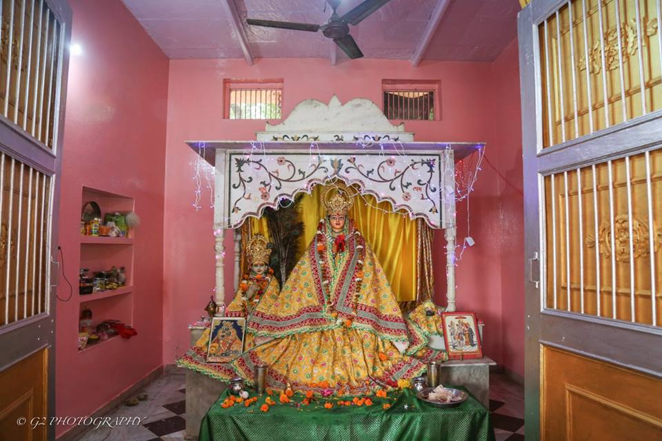 यह मन्दिर वृन्दावन के समीप जहाँगीरपुर गाँव मे है । इस सूचना को शम्भू कुमार द्वारा दिया गया है ।